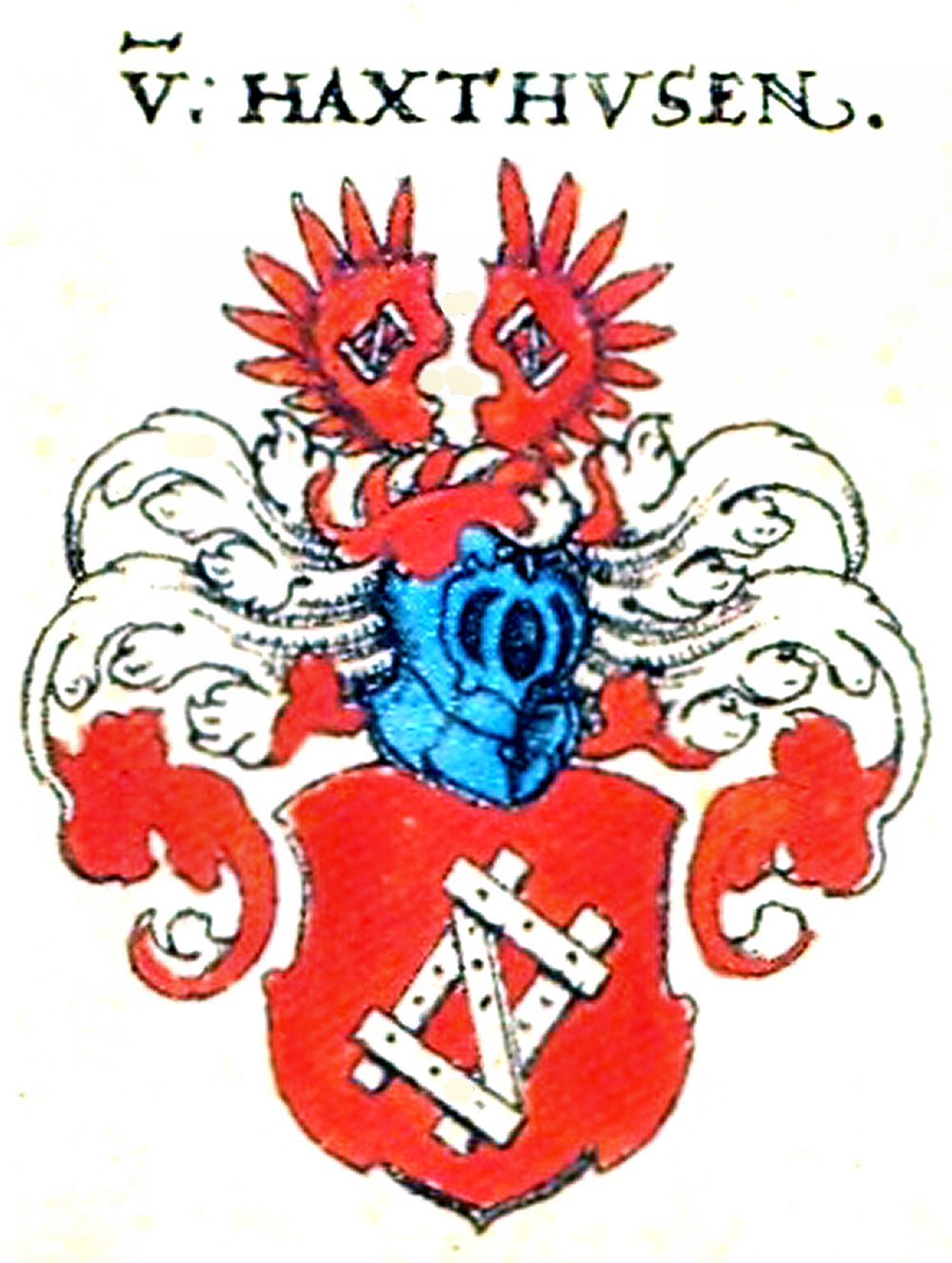 Wappen des Westfälischen und Braunschweigischen Adelsgeschlechts Haxthausen